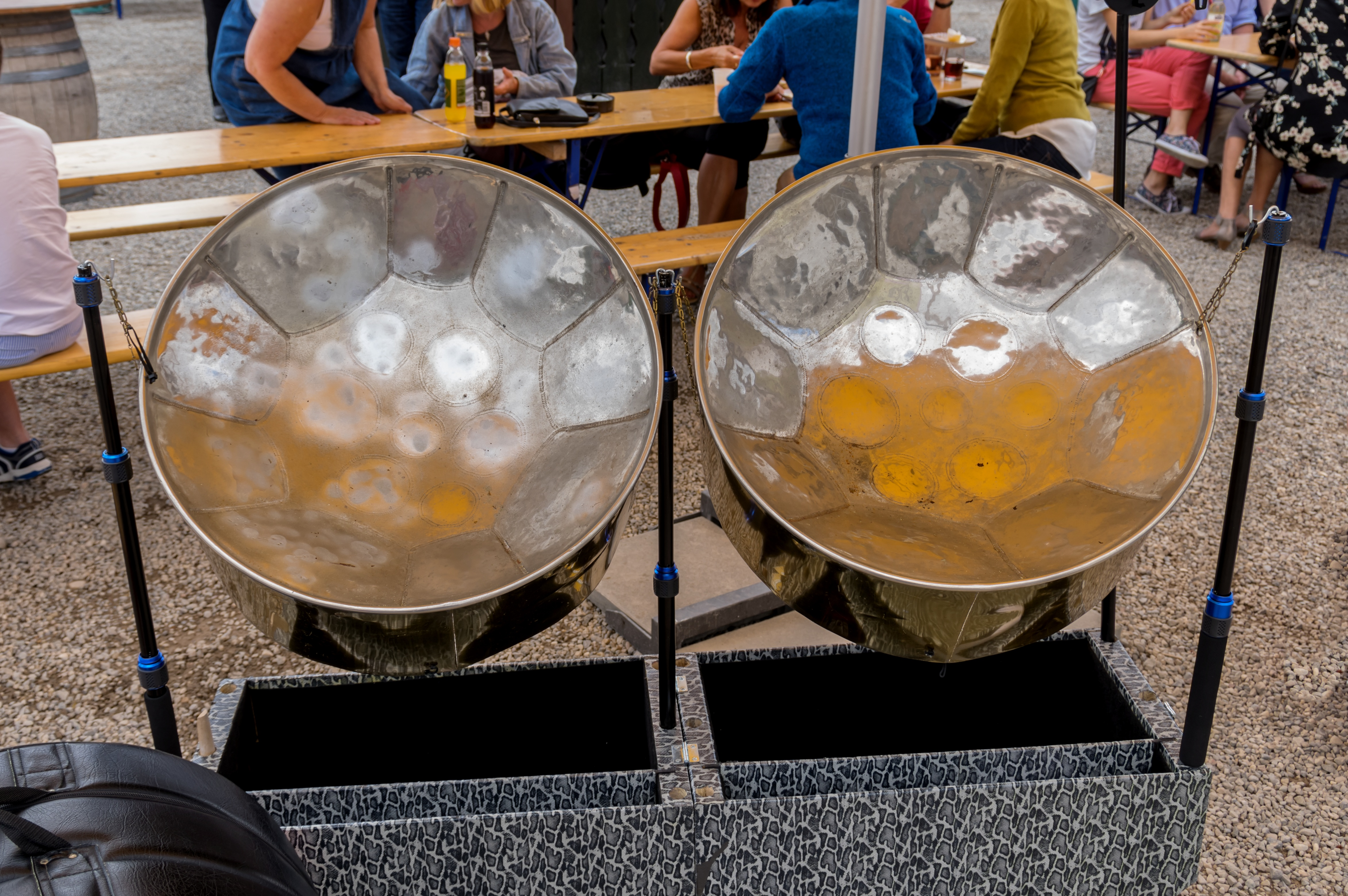 Bilder vom Zelt Musik Festival 2017 in Freiburg im Breisgau Nach der Klassikmatinee